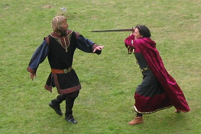 Steigen Sagaspill: "Det er din skyld!"